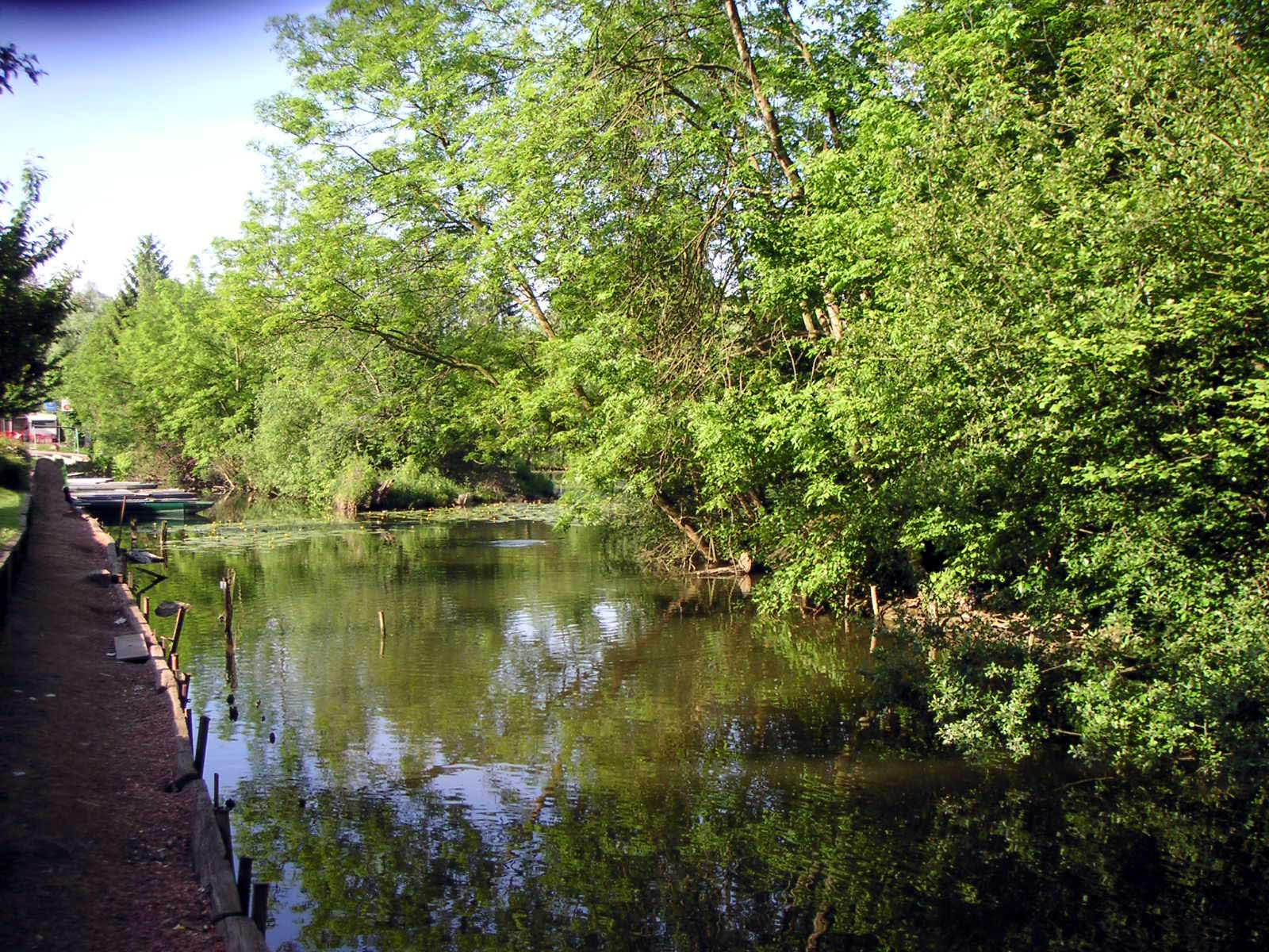 Plan d'eau et marais d'Arleux (Nord) dans la vallée de la Sensée. Péche et détente. (Padawane)